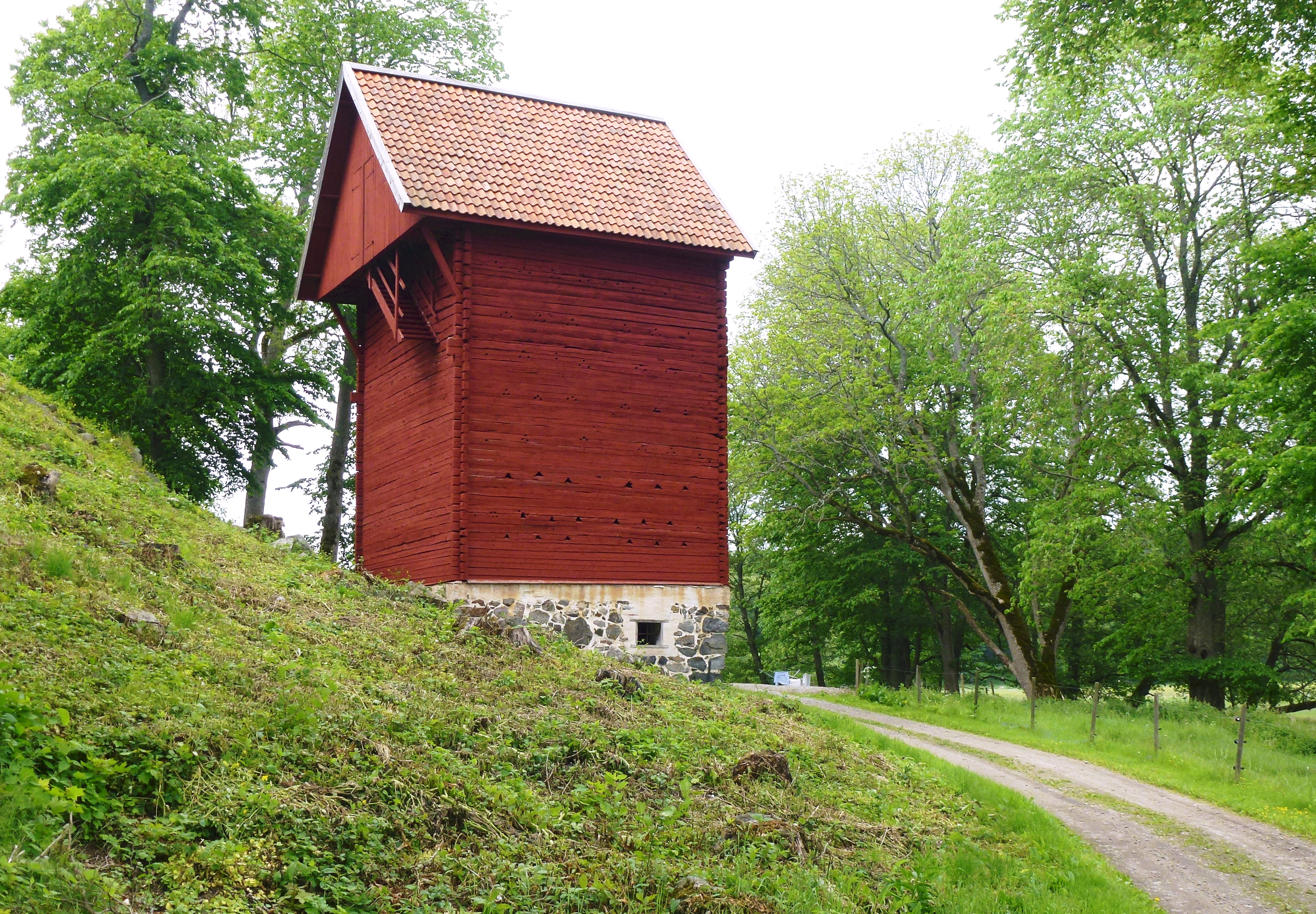 Fållnäs gård, Engelska boden, Nynäshamns kommun